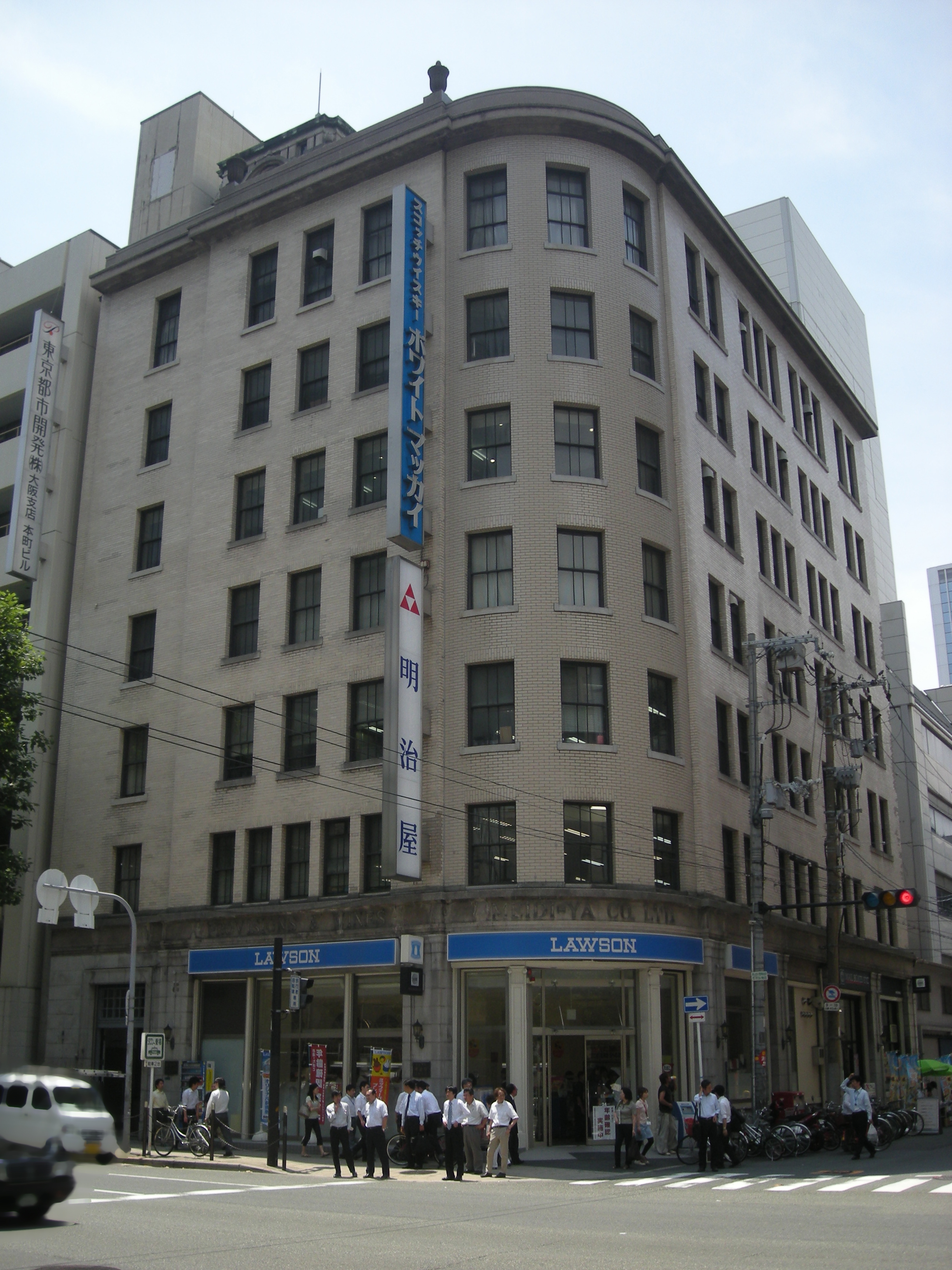 明治屋ビル